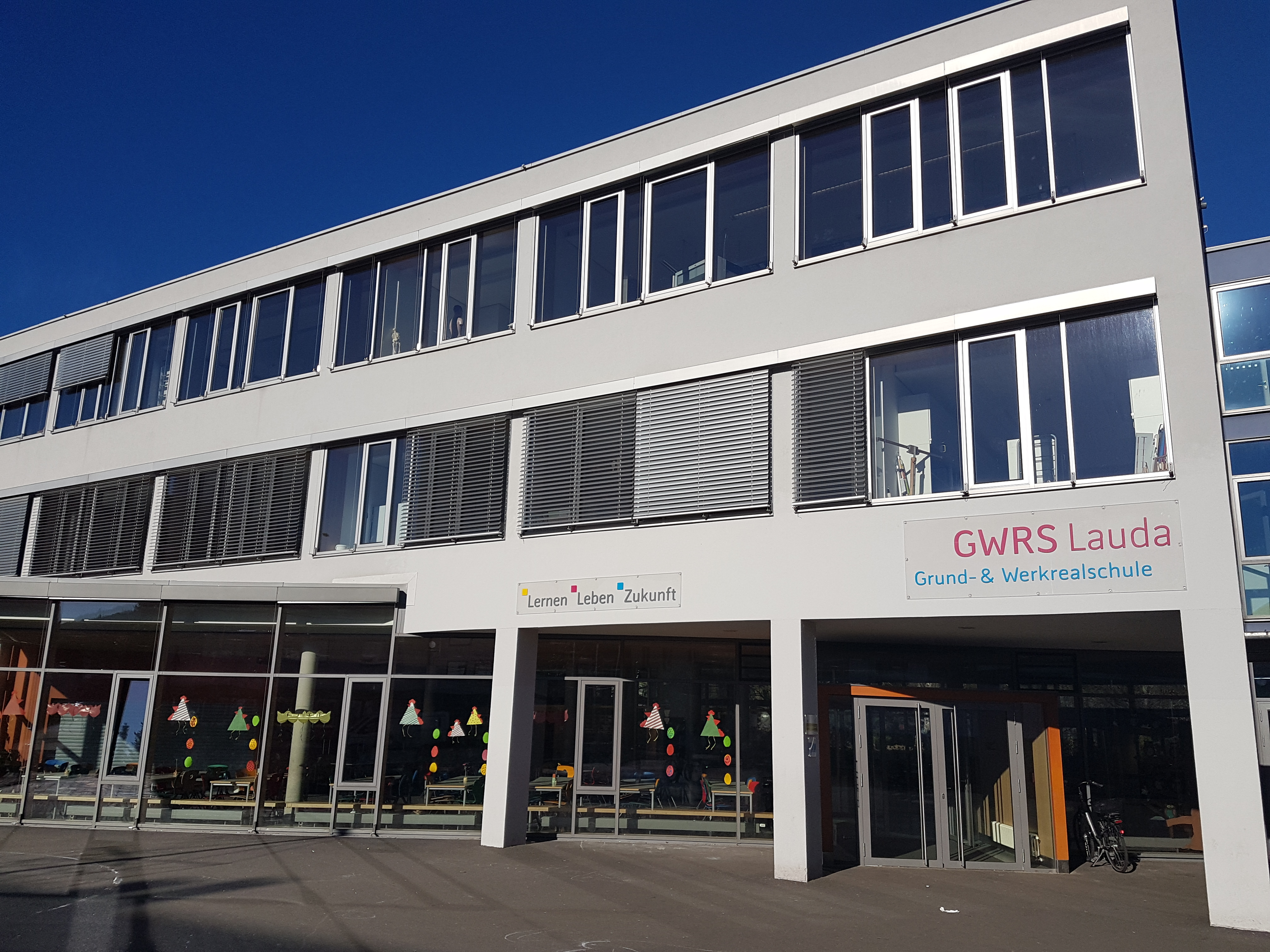 Gemeinschaftsschule Lauda-Königshofen Neubau mit Verwaltung und Mensa